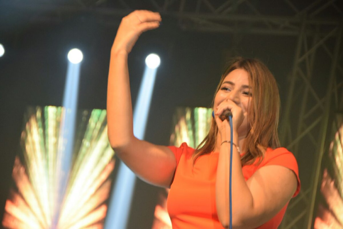 هايدي موسى